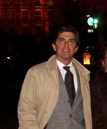 Escritor argentino